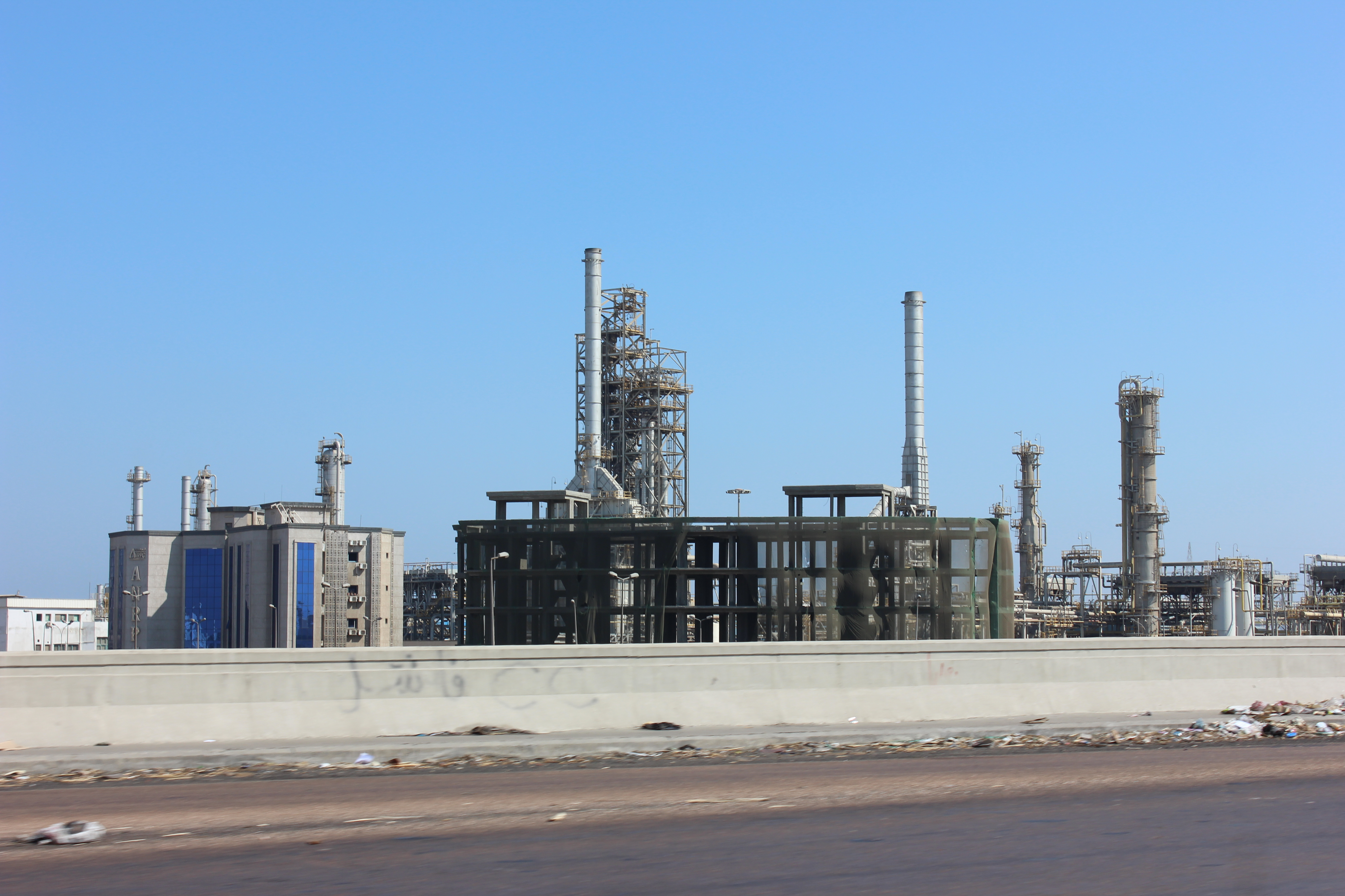 الطريق الدولي الساحلي بالإسكندرية.